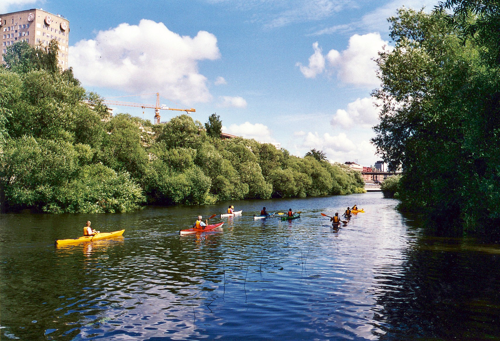 Barnhusviken i Stockholm, Bonniershuset till vänster.